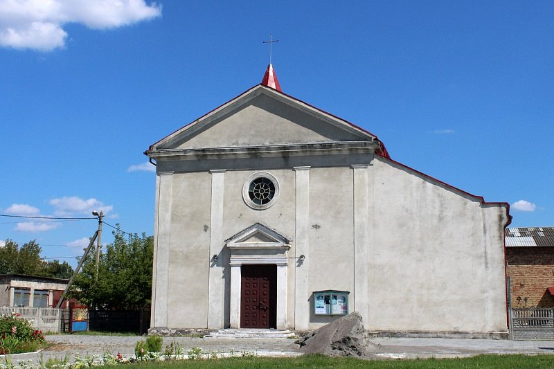 Лунінец. Касцёл